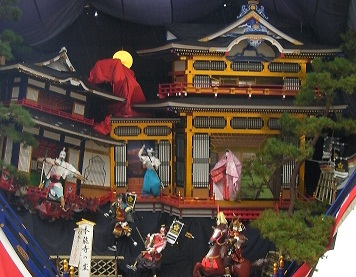 2010年10月9日に行われた珠洲デカ曳山祭りの写真。